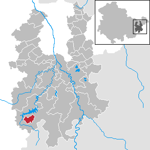 Langenwolschendorf in Thuringia - District Greiz